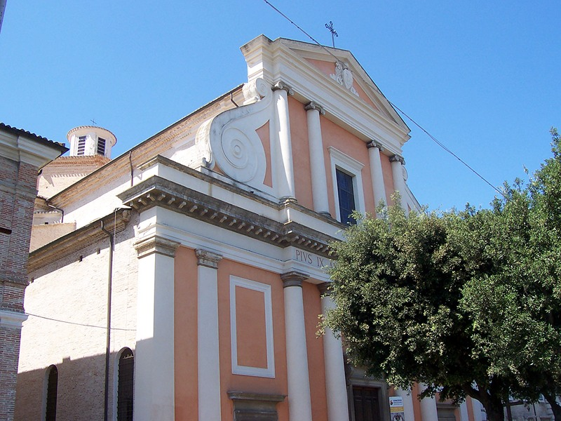 Senigallia - Duomo